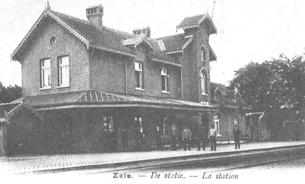 Het stationsgebouw te Zele